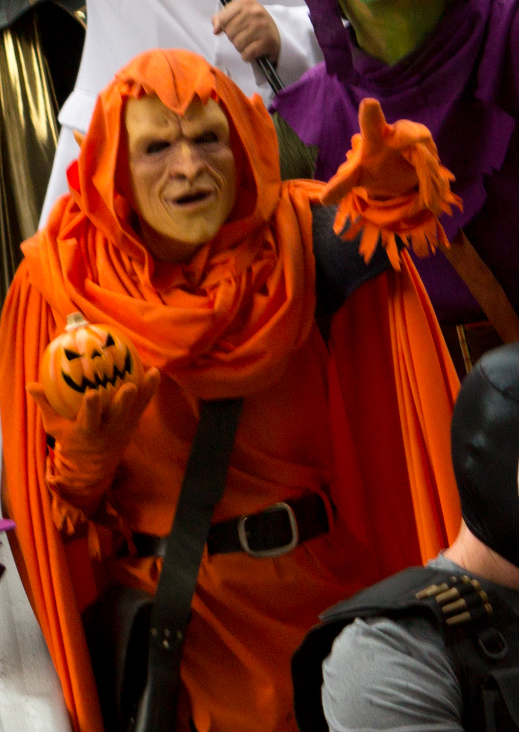 Cosplay at Dragon*Con 2013.